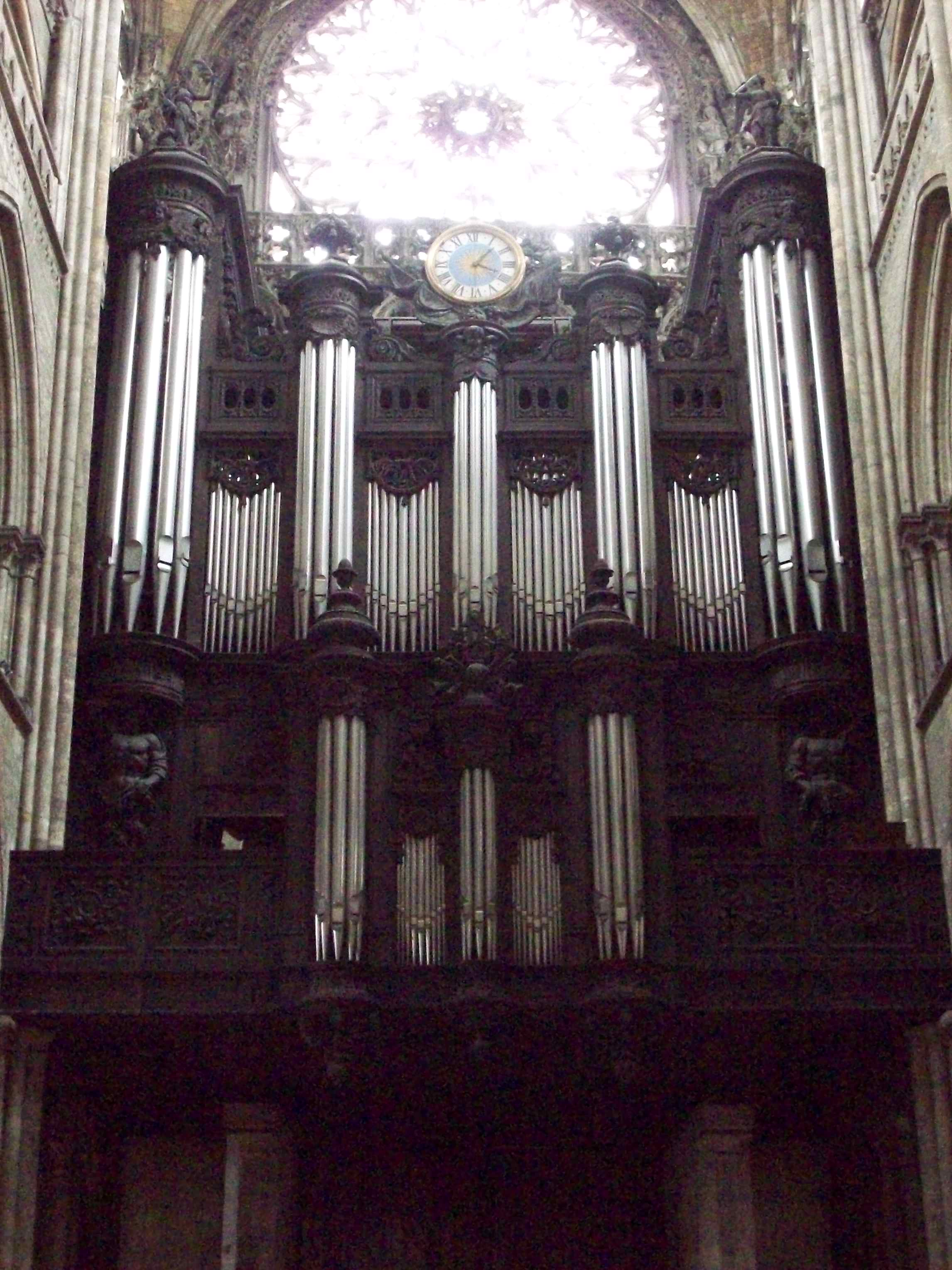 Grand orgue de la cathédrale de Jacquot-Lavergne.